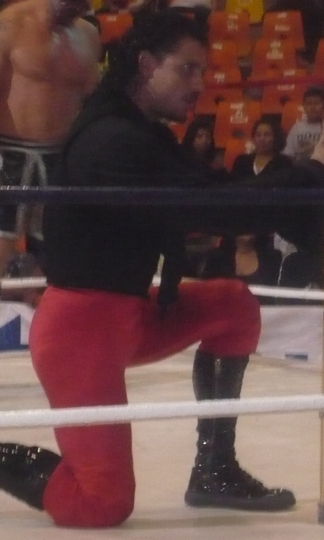 El Zorro luchando en AAA.